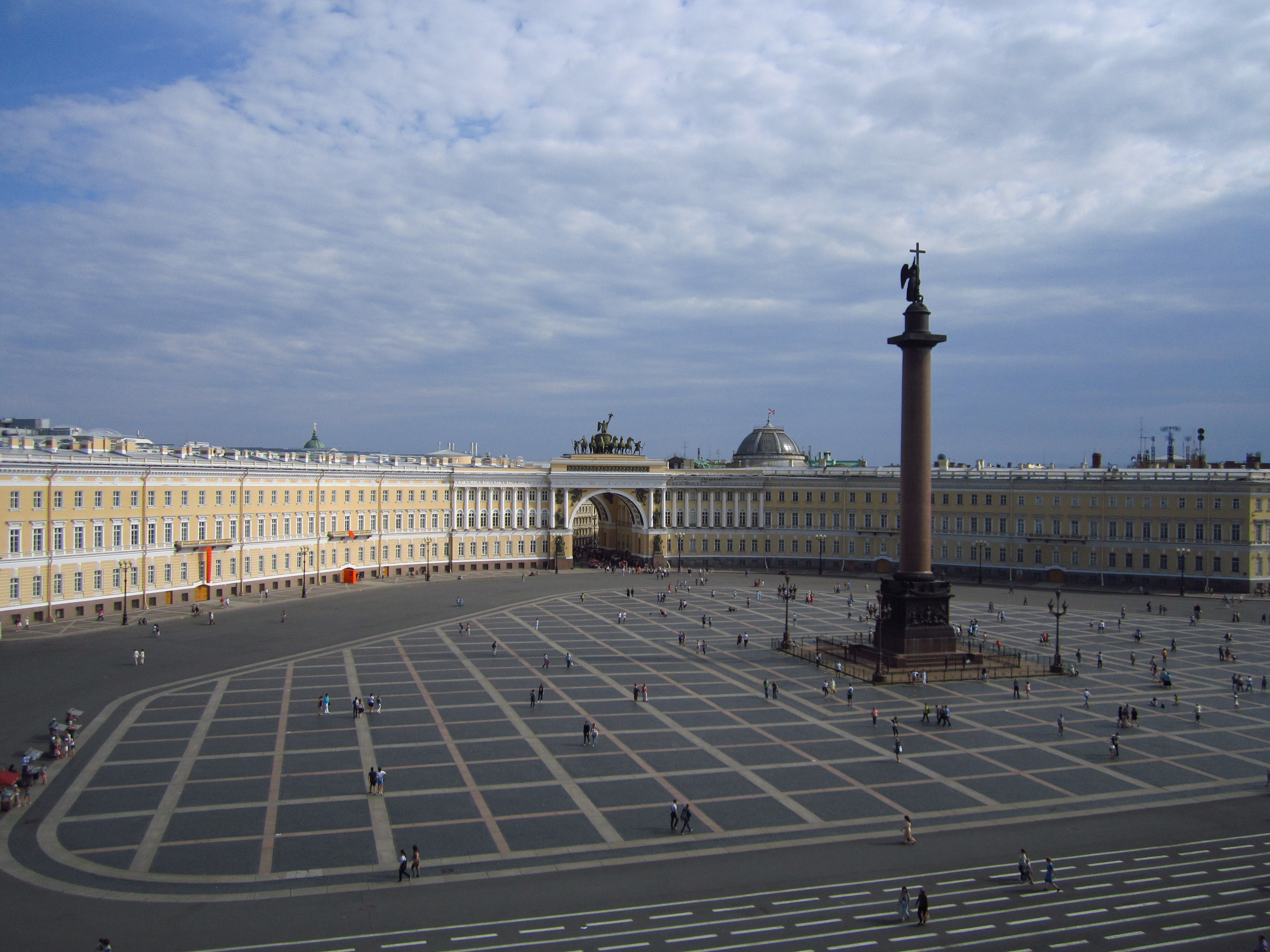 Главный штаб и Министерства (Санкт-Петербург и Лен.область, Санкт-Петербург, Дворцовая площадь, 6, 8, 10, Невский проспект, 2, Большая Морская улица, 1, 2, р. Мойки наб., 39-47)